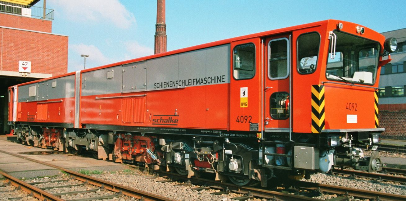 Schienenschleifmaschine seit 1995 bei den Berliner Verkehrsbetrieben im Einsatz